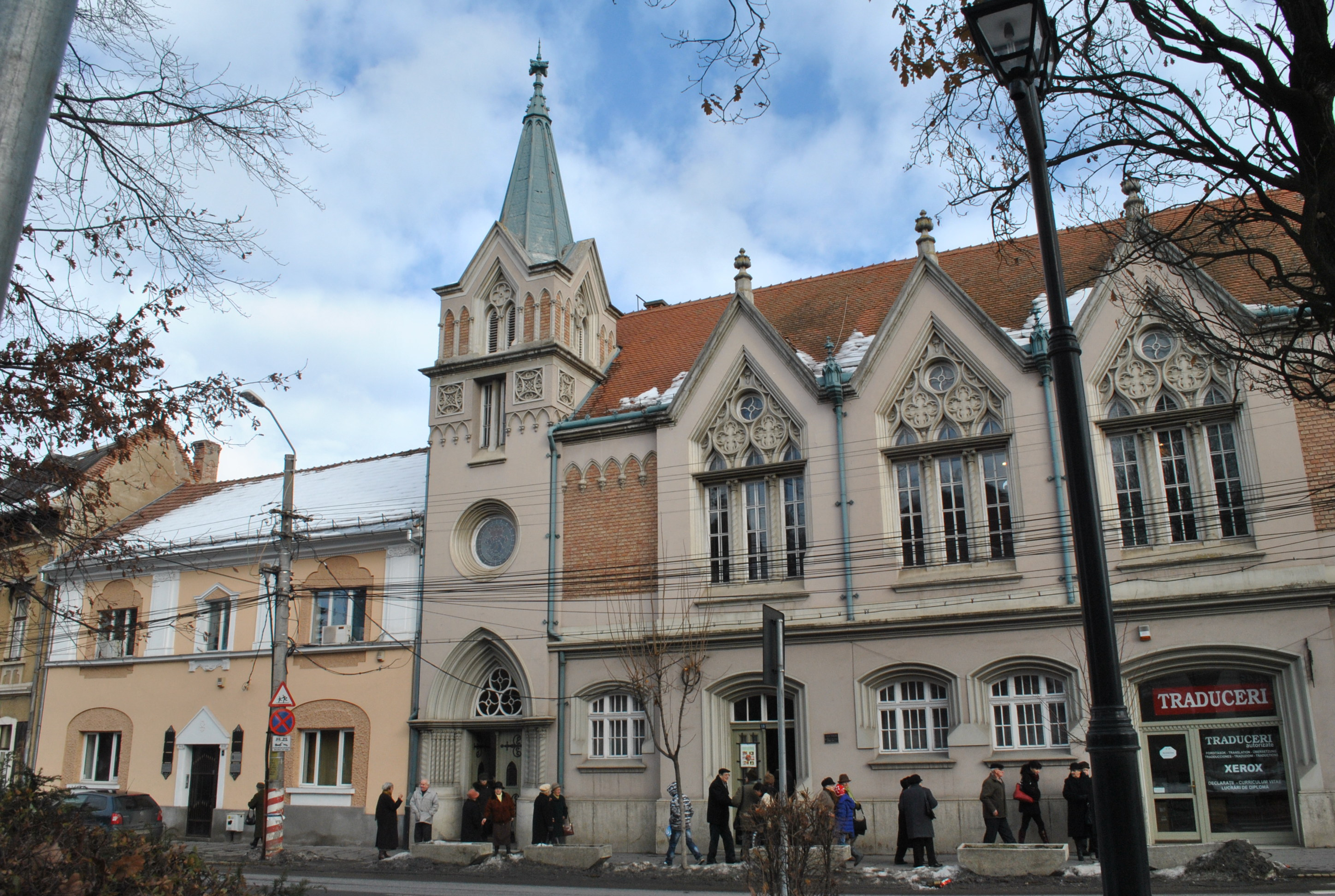 Târgu Mureș, clădire, la parter birouri, comerț, la etaj biserica unitariană, 1929